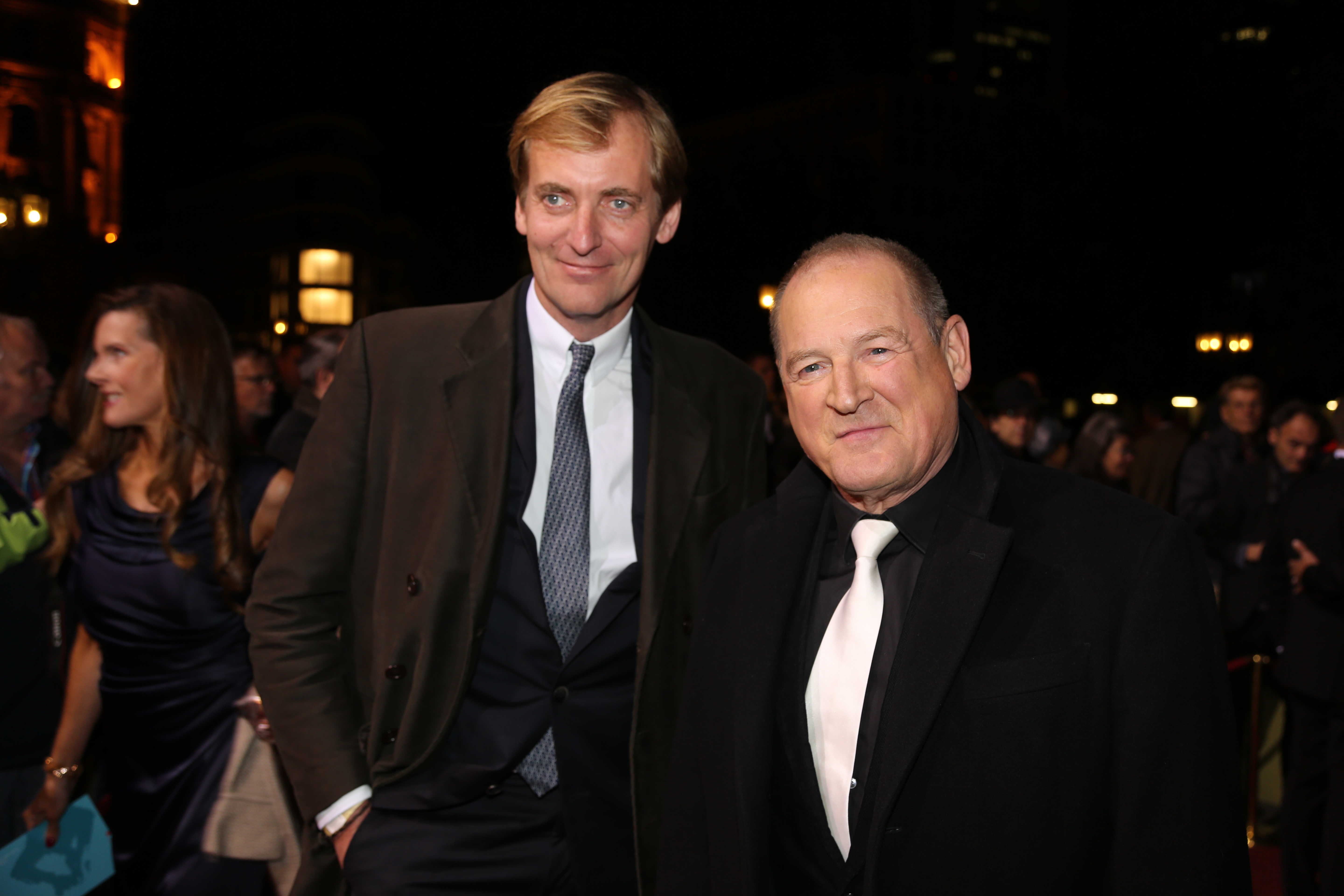 Lars Kraume und Burghart Klaußner beim Hessischen Film- und Kinopreis 2015